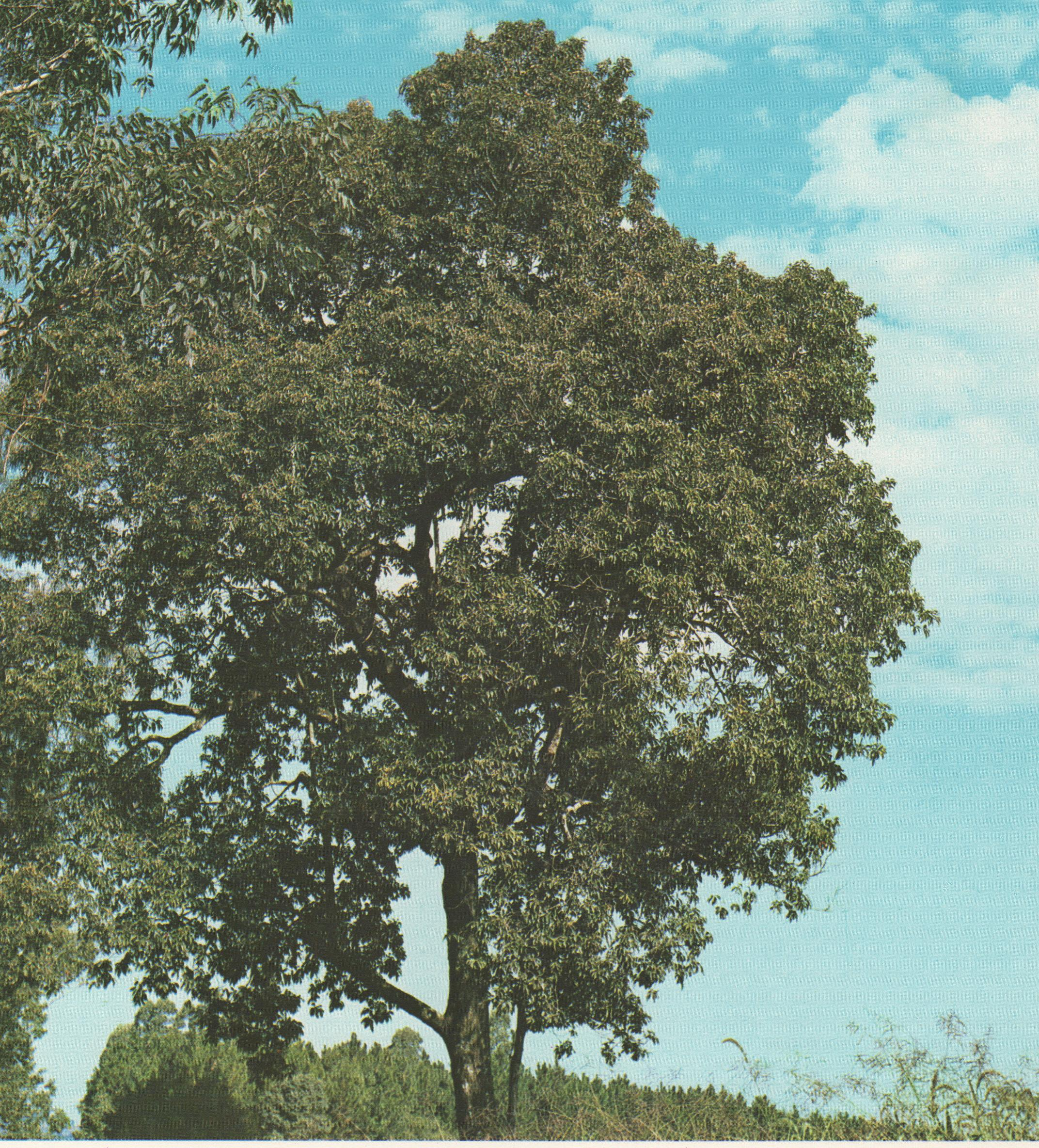 Ejemplar de Nectandra saligna en la Argentina.